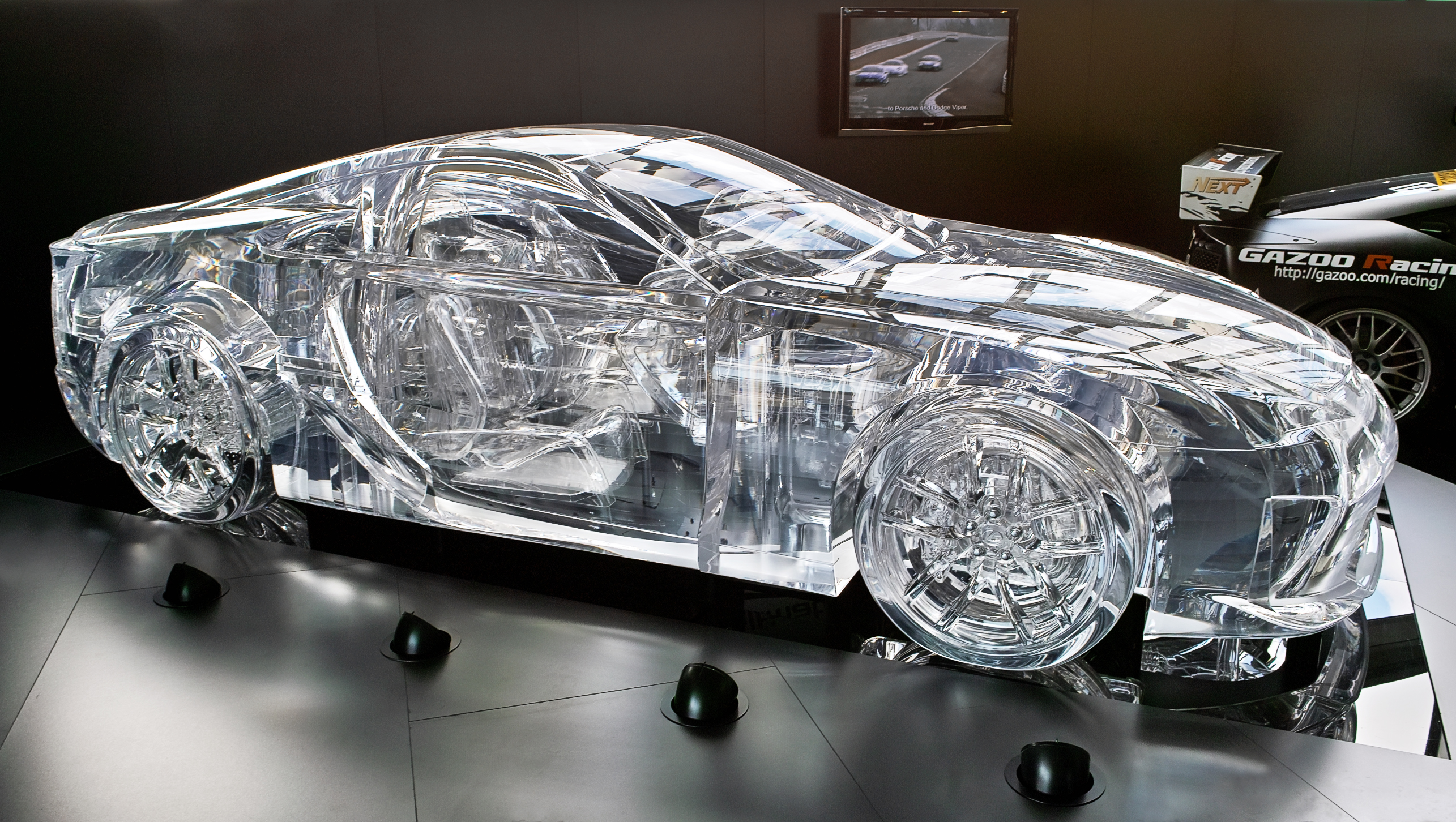 Goodwood FOS 2009